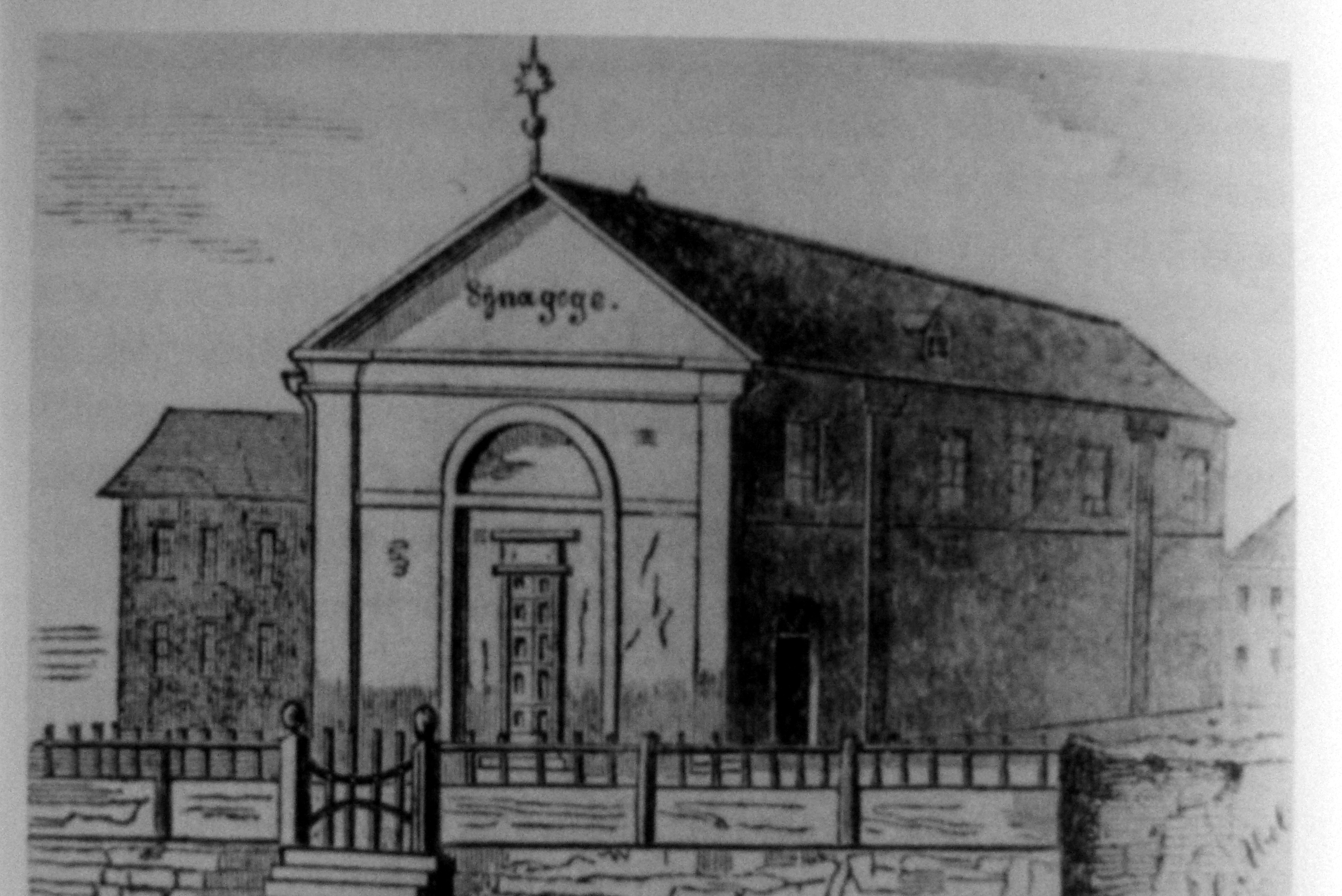 Synagoge Bad Ems